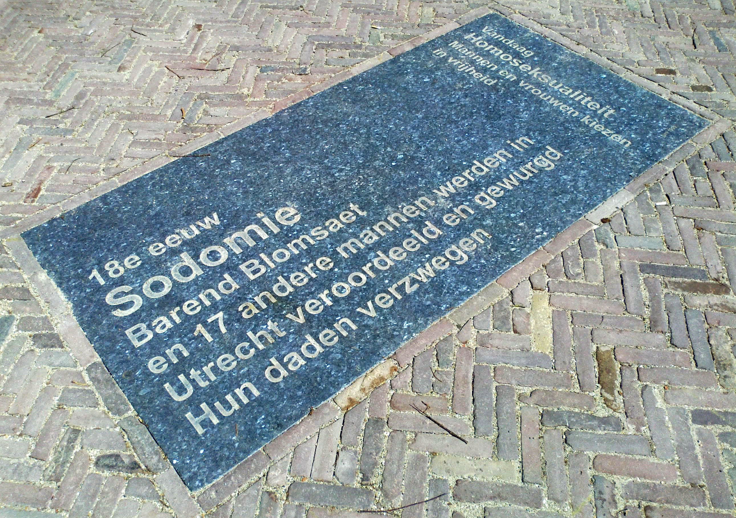 Homomonument Utrecht